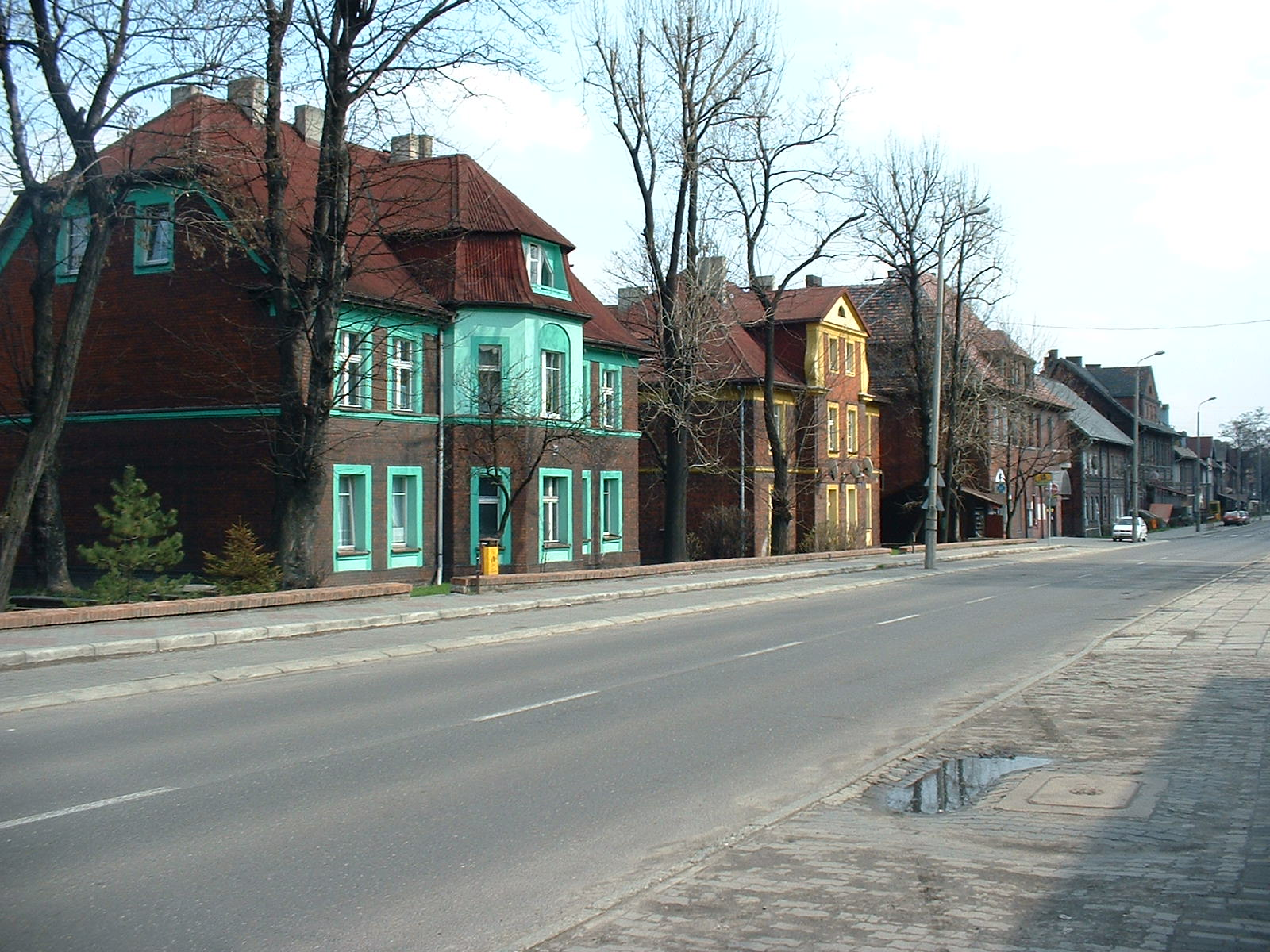 ulica Wociecha Korfantego, Radlin, Silesia, Poland